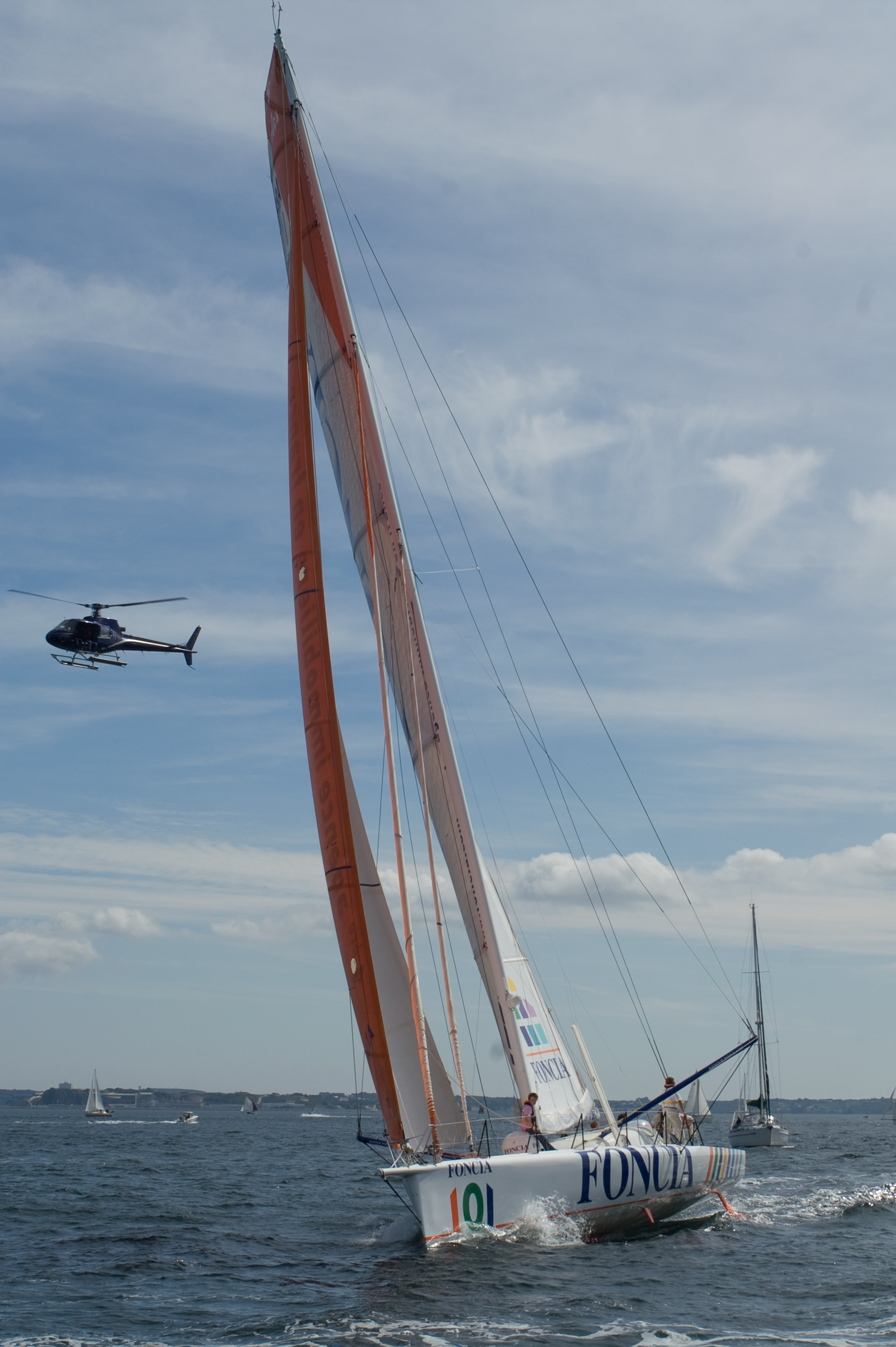 Foncia, IMOCA 60'